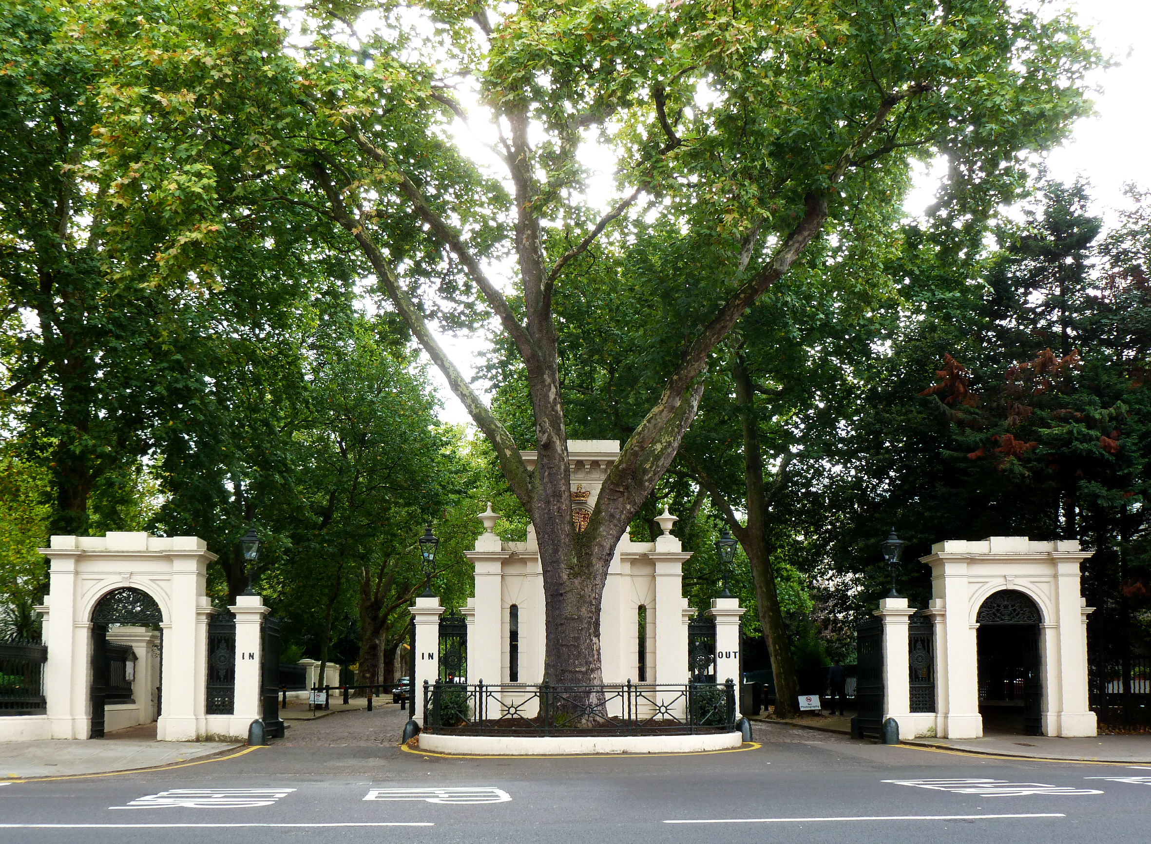 Eingangsbereich zu den Kensington Palace Gardens, London. An dieser Allee residieren sehr viele Botschaften und Superreiche, deshalb ist ist die Zufahrt mit Fahrzeugen aller Art nur mit Sondererlaubnis gestattet. Es besteht ein Fotografierverbot hinter den Toren.